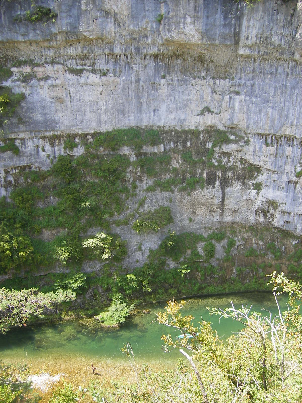 Gorges du Tarn, between La Malène and Les Vignes